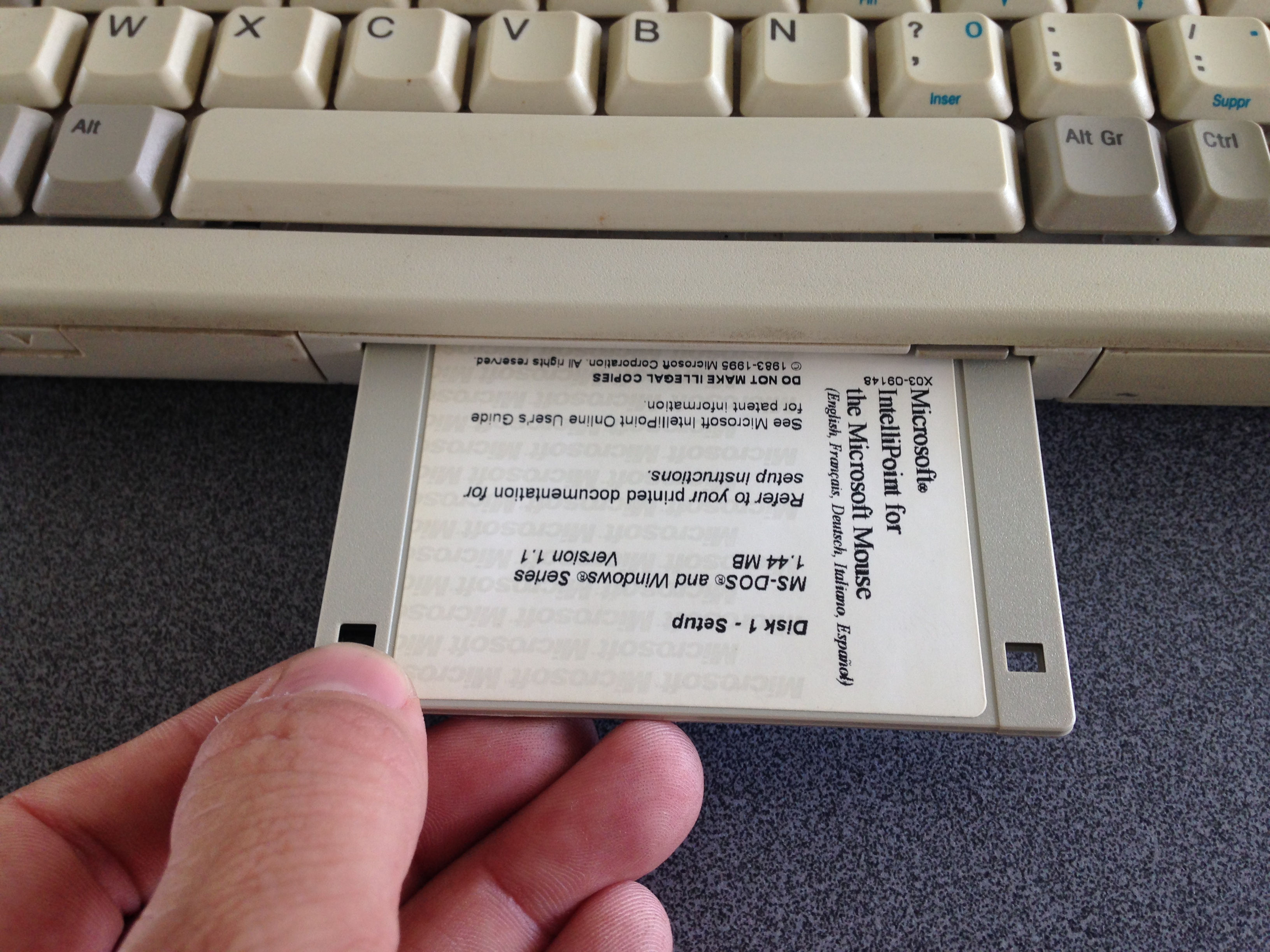 Inserción de un disquete de 3.5 pulgadas en el drive de una laptop COMPAQ LTE